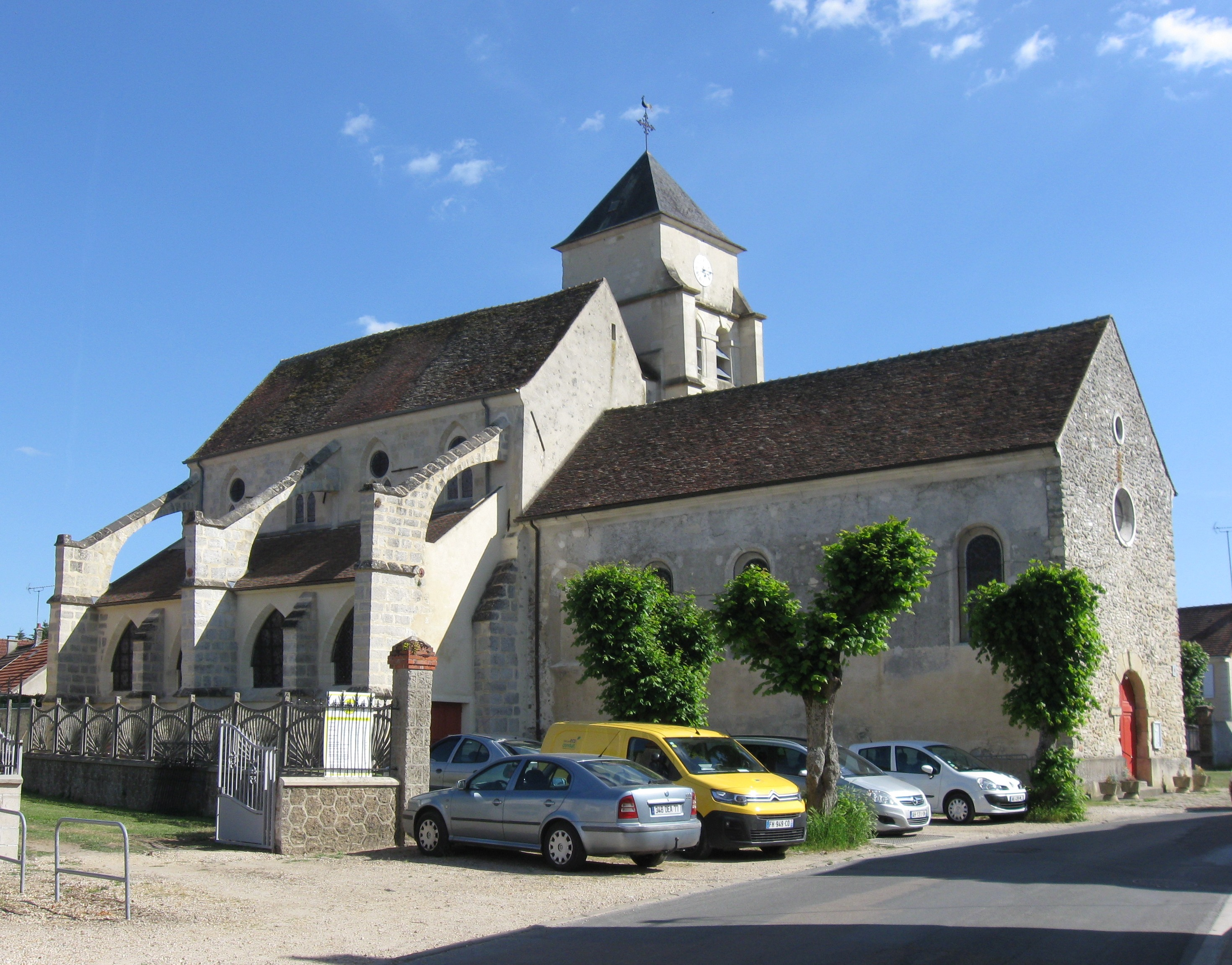 Église Saint-Rémi de Congis-sur-Thérouanne. (Seine-et-Marne, région Île-de-France).